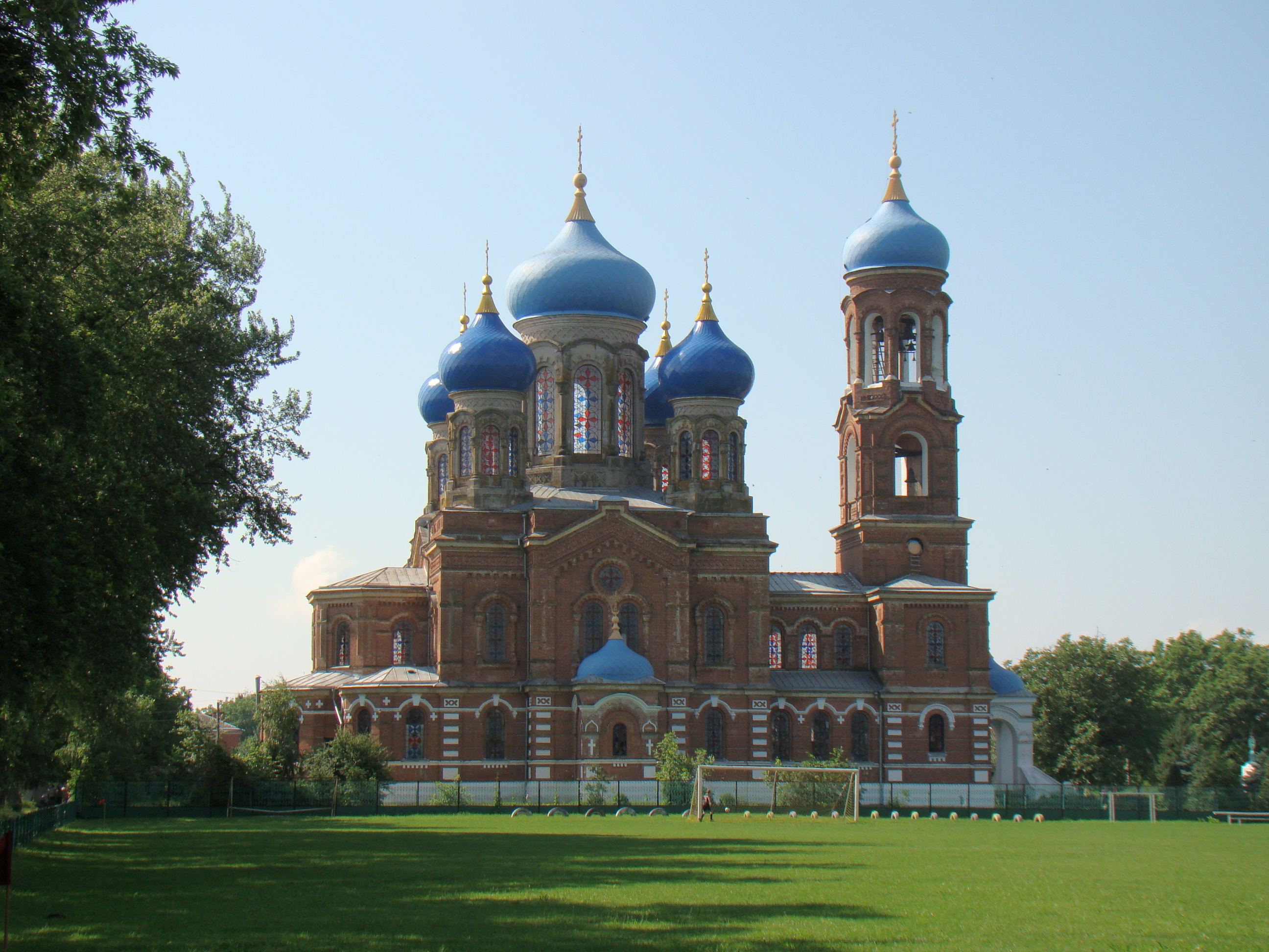 Станица Воронежская. Храм Рождества Пресвятой Богородицы (1911-1914 гг.)